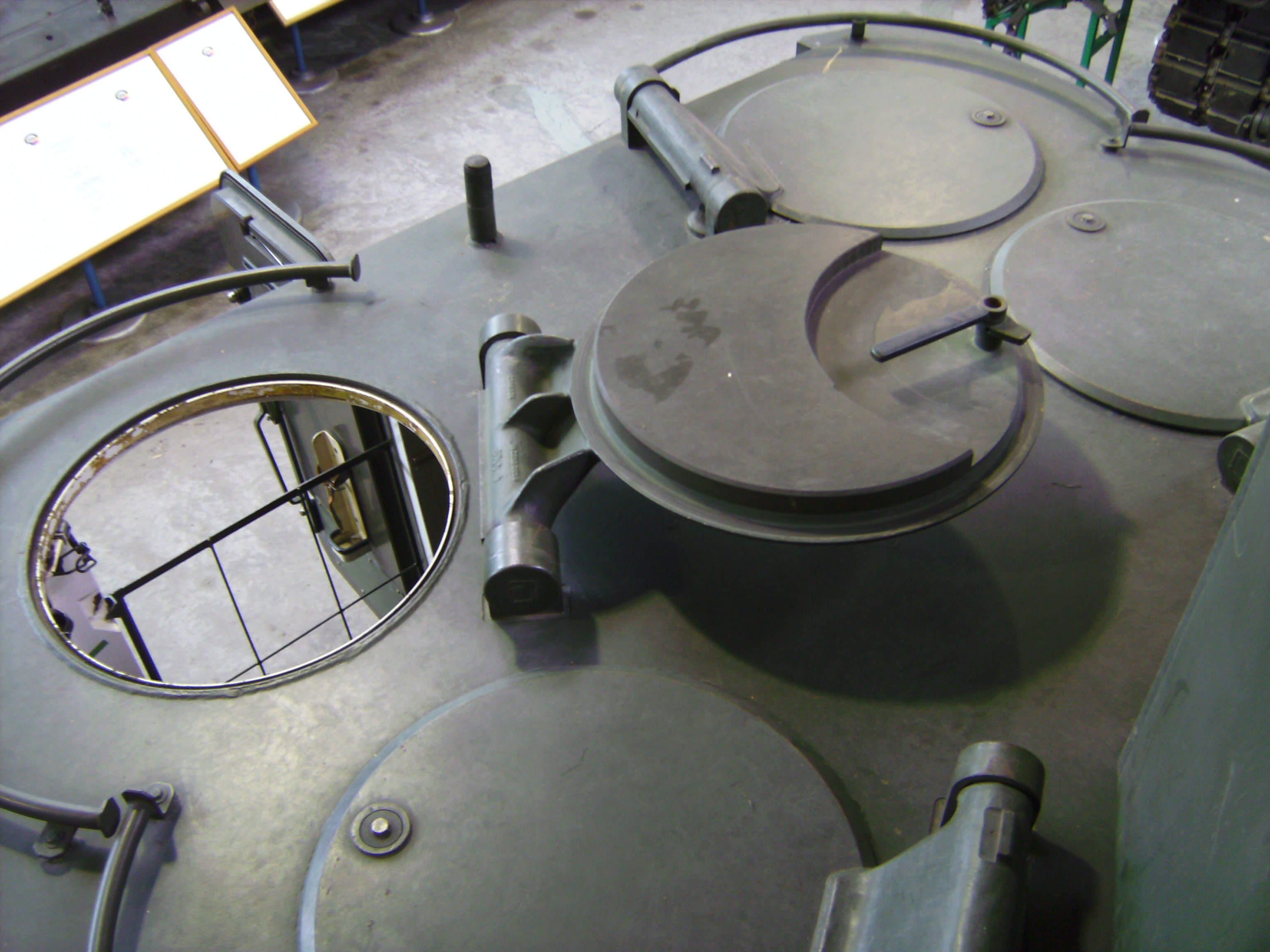 Marder 2 in der Wehrtechnischen Studiensammlung in Koblenz